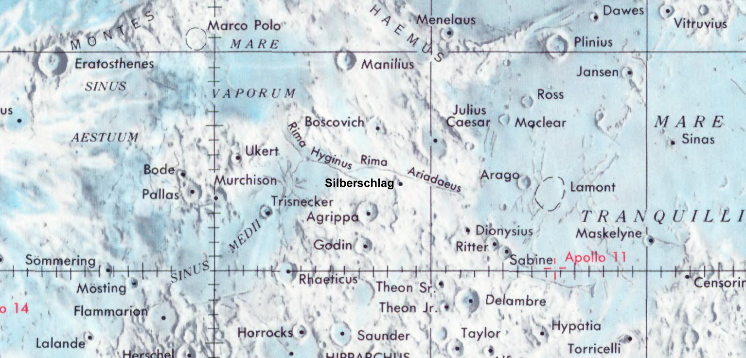 Cráter lunar Silberschlag. Localización. (Lunar Chart LPC1. Second Edition)